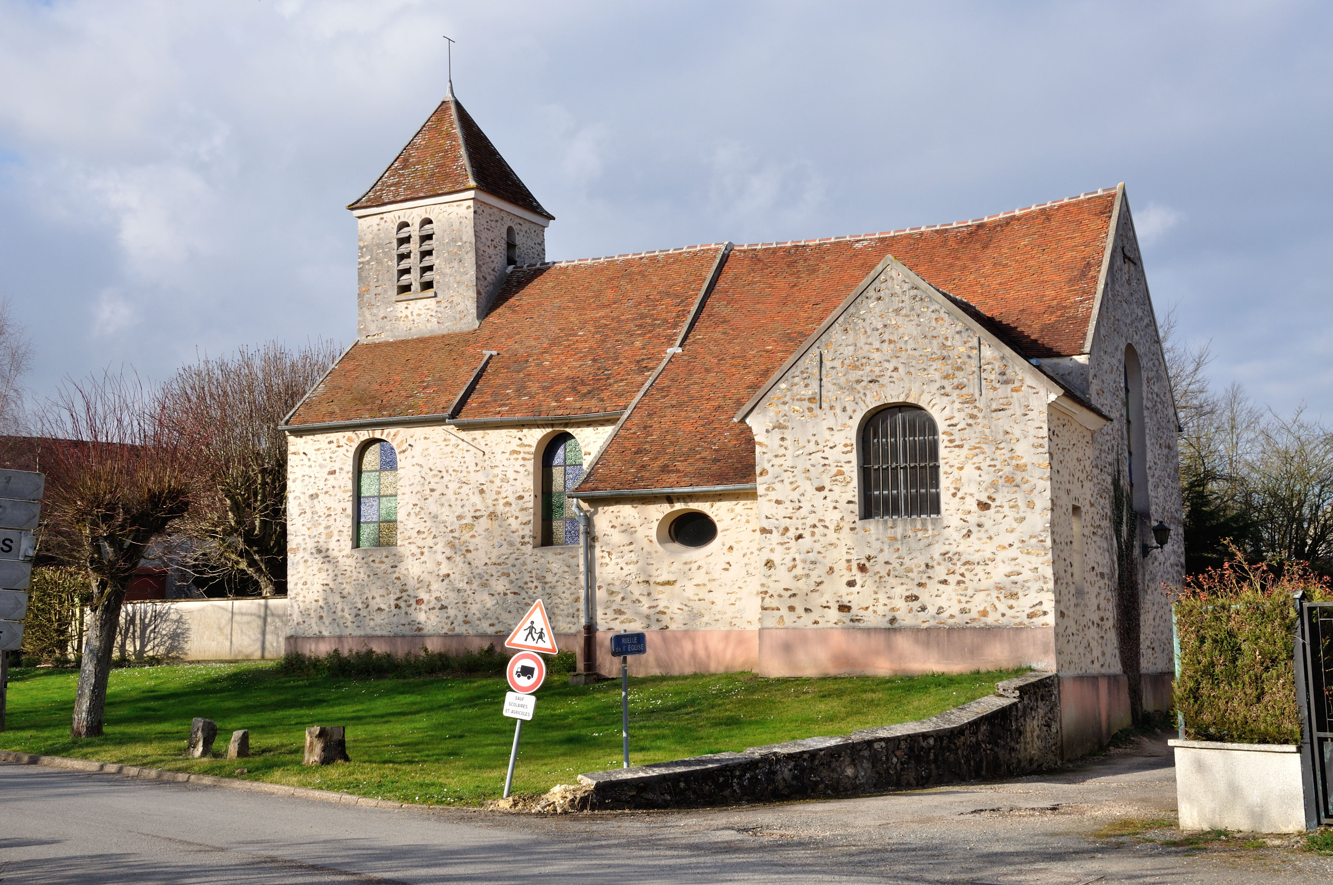 Église Saint-Pierre de Giremoutiers. (Seine-et-Marne, région Île-de-France).